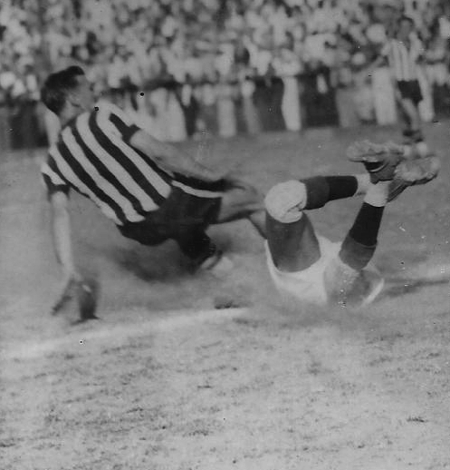 Português do Brasil: Paschoal marcando com firmeza.